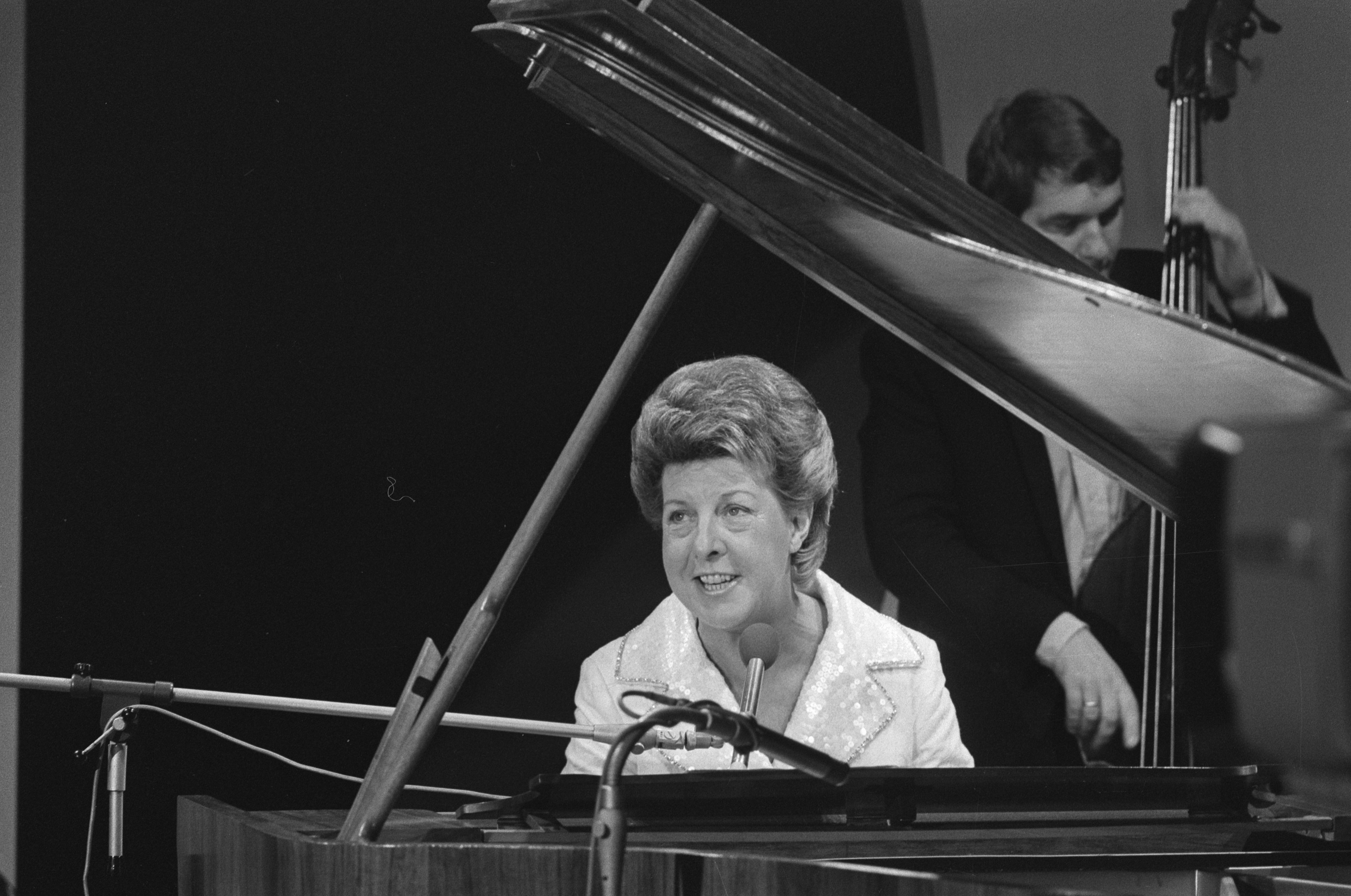 Collectie / Archief : Fotocollectie Anefo Reportage / Serie : [ onbekend ] Beschrijving : "n rondje theater" van KRO-TV; Pia Beck tijdens opname Datum : 12 november 1975 Persoonsnaam : Beck, Pia Fotograaf : Croes, Rob C. / Anefo Auteursrechthebbende : Nationaal Archief Materiaalsoort : Negatief (zwart/wit) Nummer archiefinventaris : bekijk toegang 2.24.01.05 Bestanddeelnummer : 928-2661